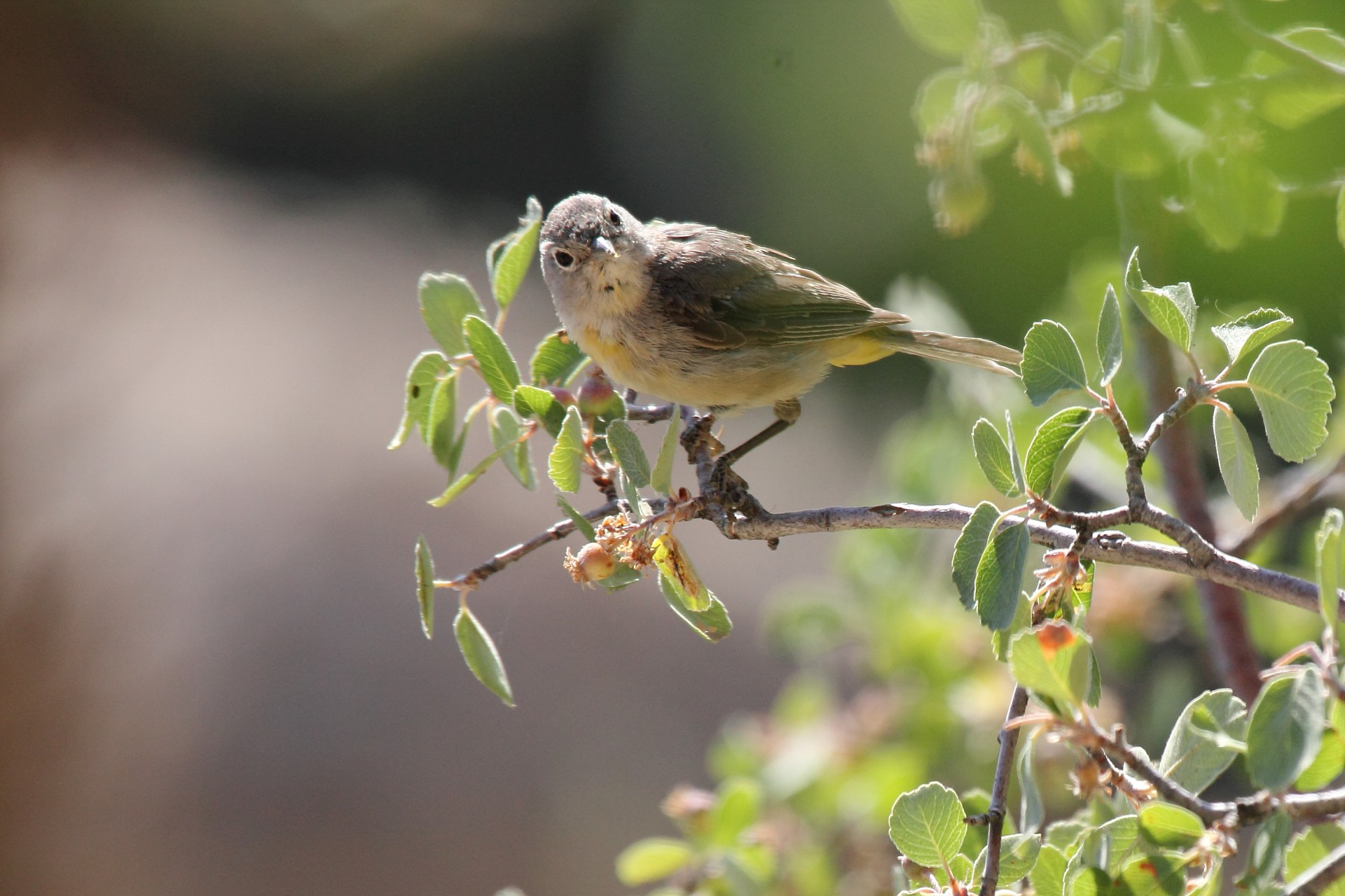 Virginia's Warbler Leiothlypis virginiae